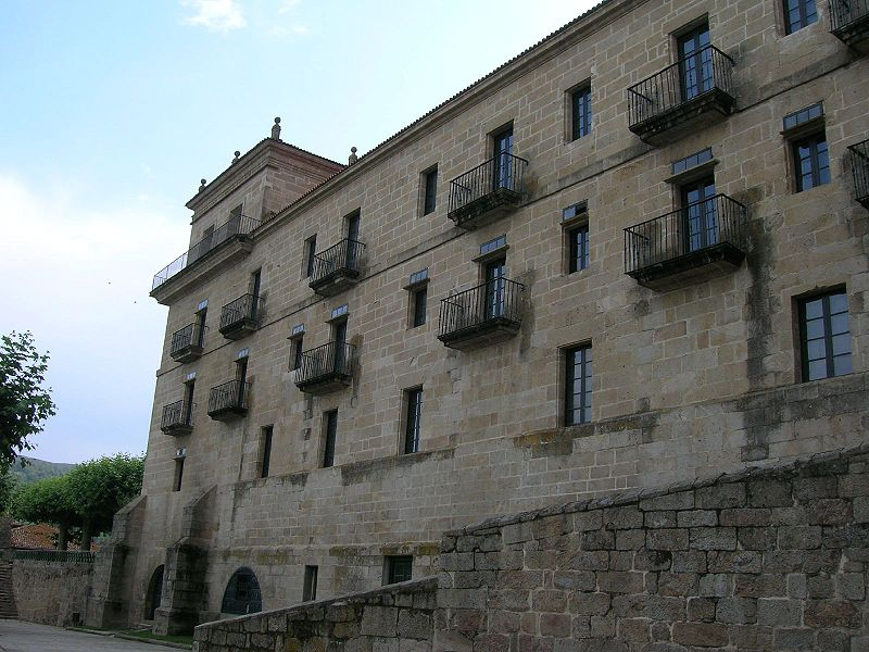 Description